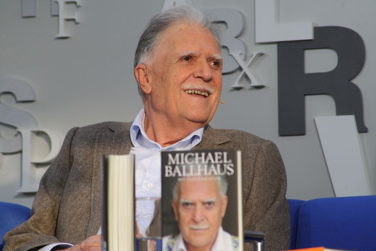 Michael Ballhaus auf dem "Blauen Sofa" auf der Leipziger Buchmesse 2014